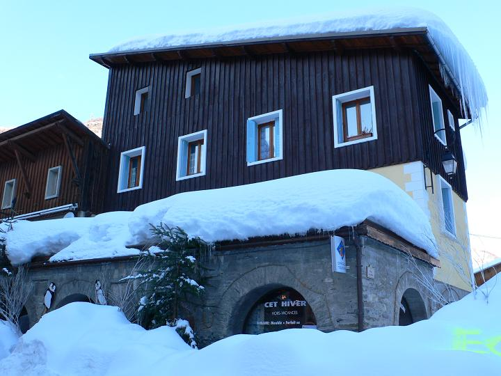 Abriès - Mairie